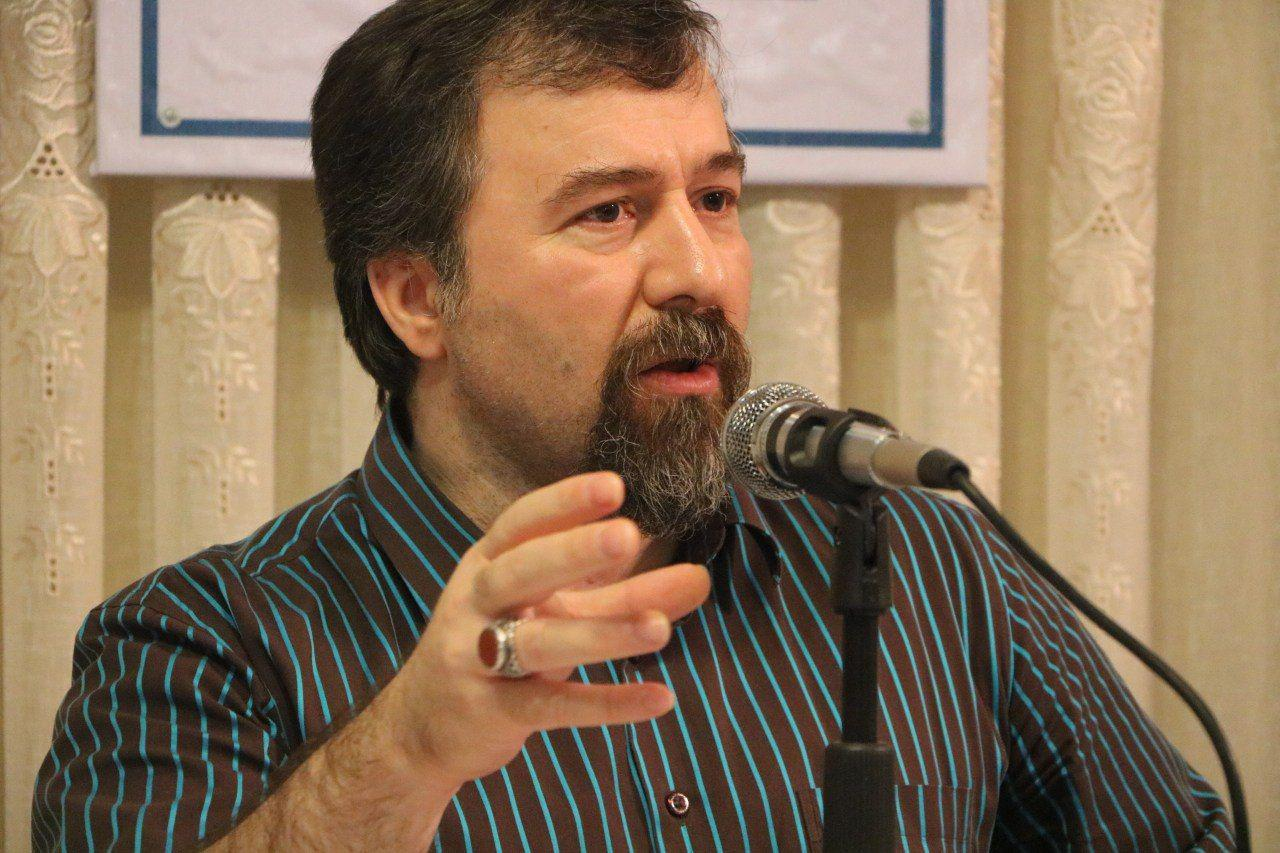 Seyed Javad Miri Meynagh